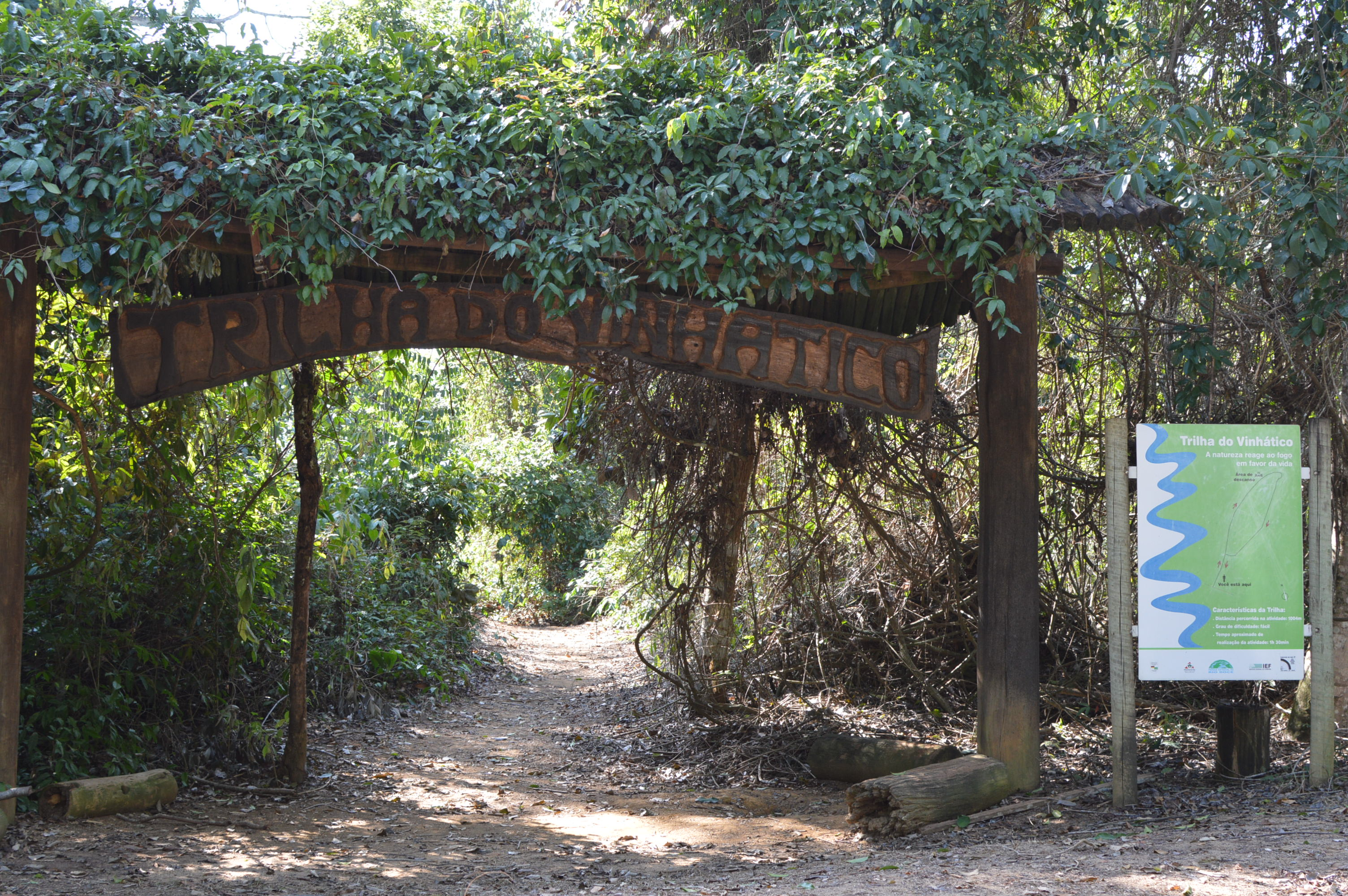 Os visitantes podem fazer trilhas no parque, como a trilha do vinhático